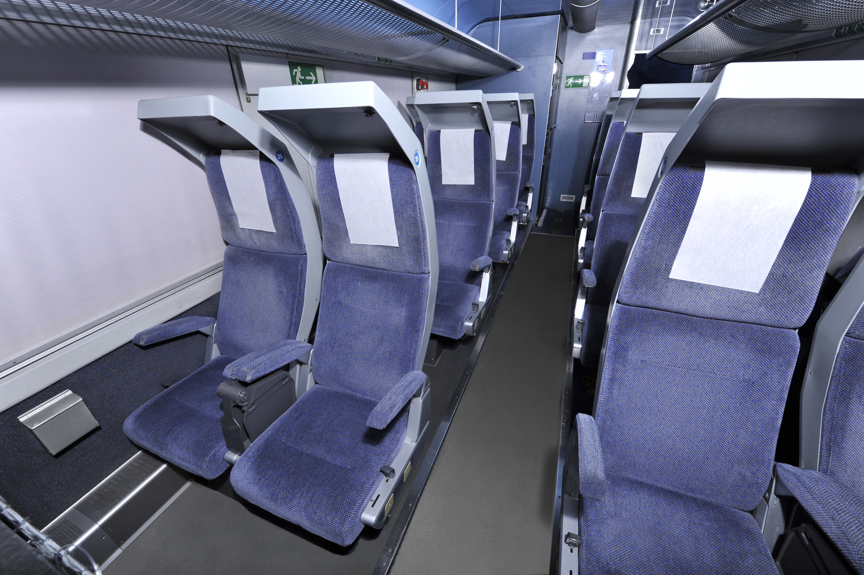 CityNightLine-Ruhesessel